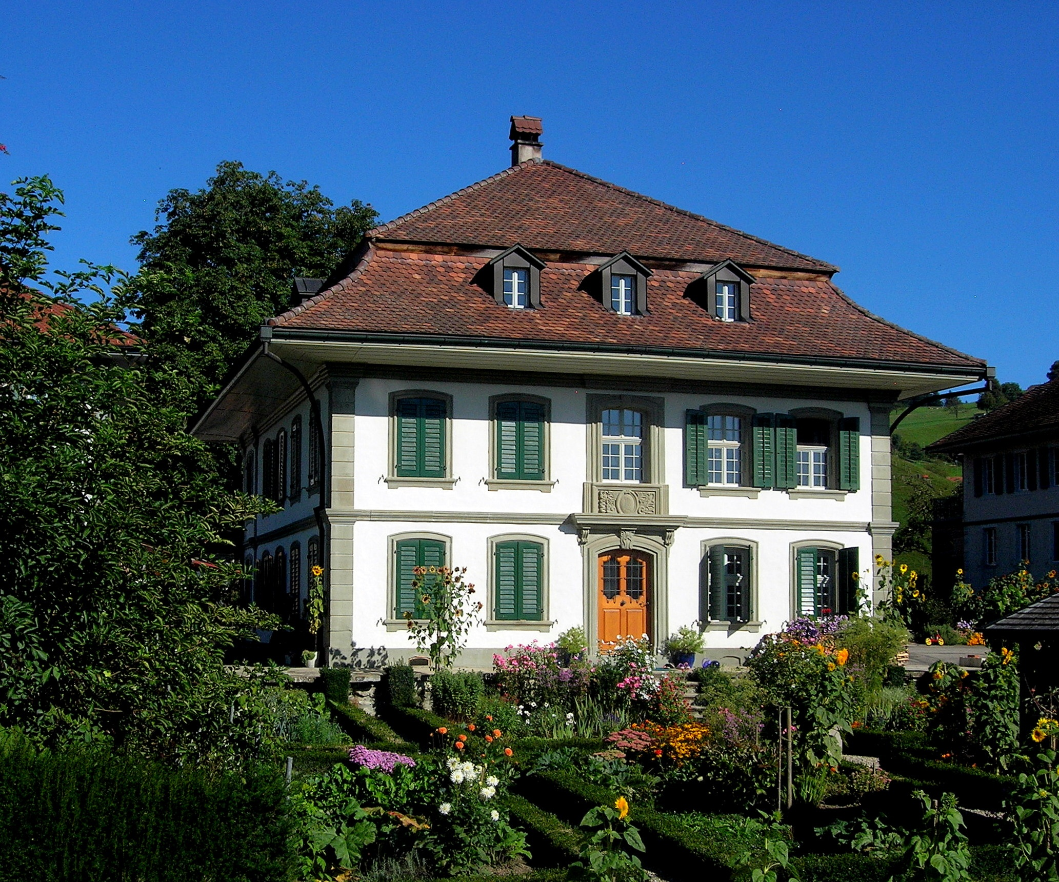 Gärbihof, Dürrenroth